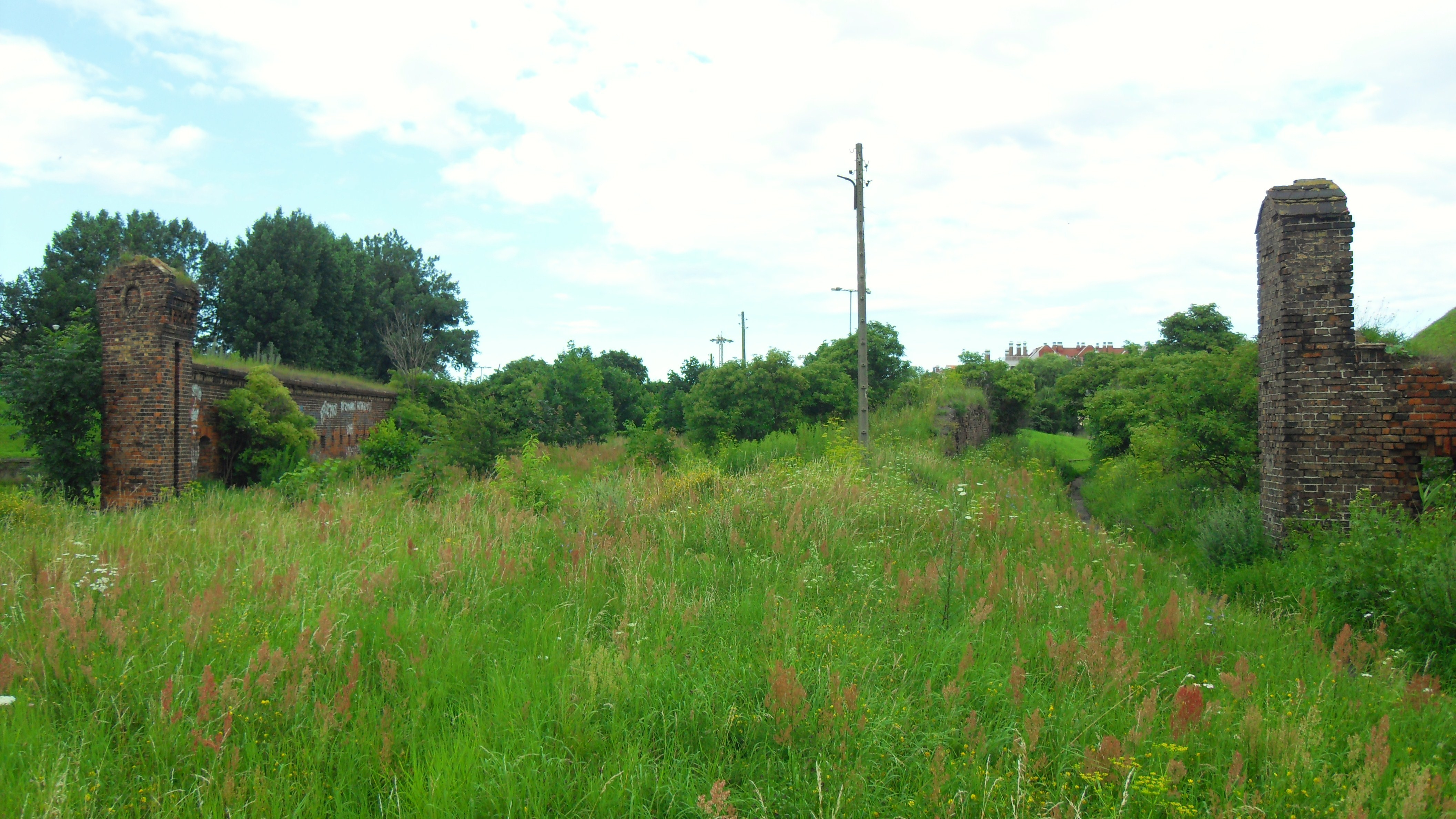 Gdańsk Stare Przedmieście, historyczna brama do stacji Gdańsk Brama Nizinna.